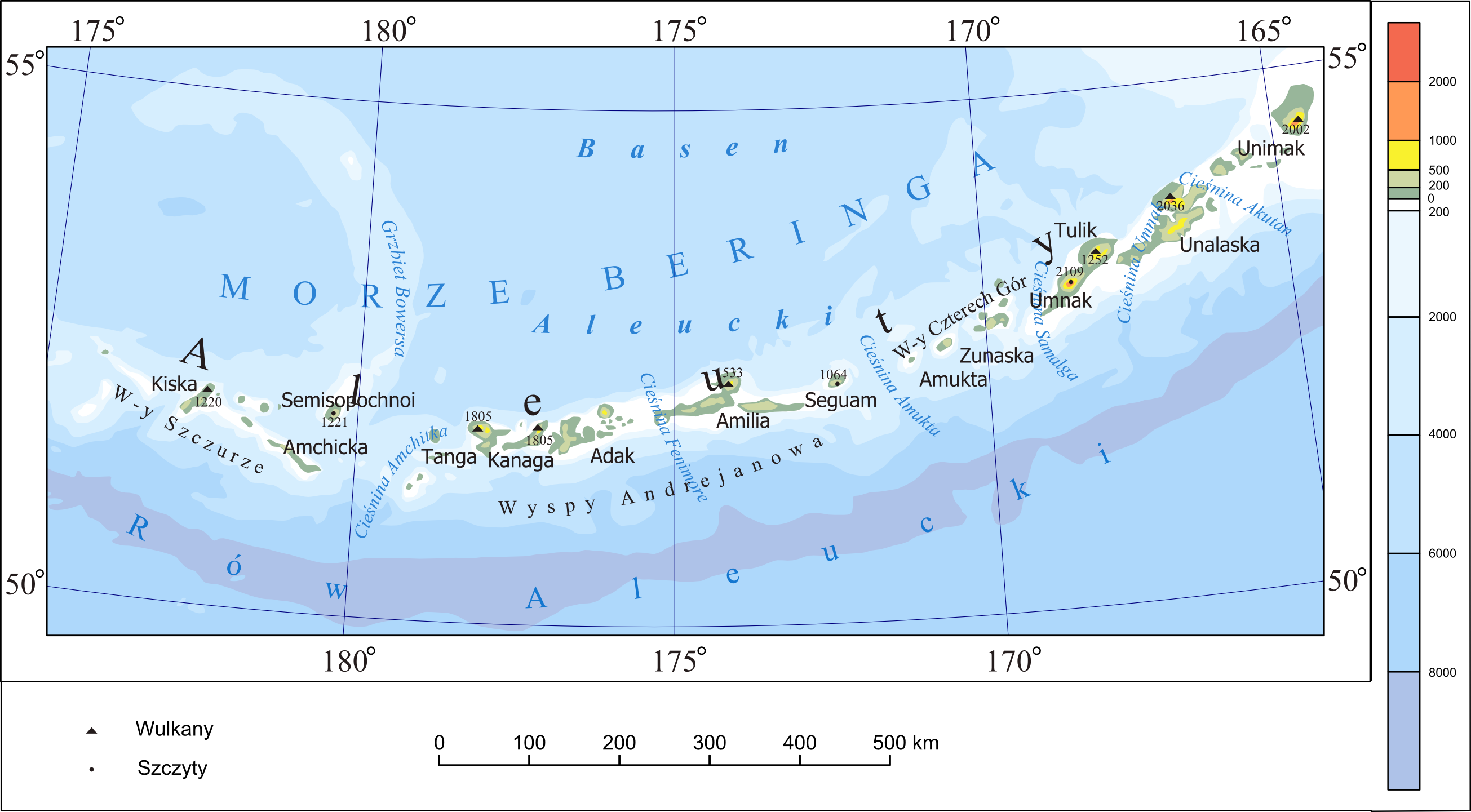 Mapa Hipsometryczna Rowu Aleuckiego